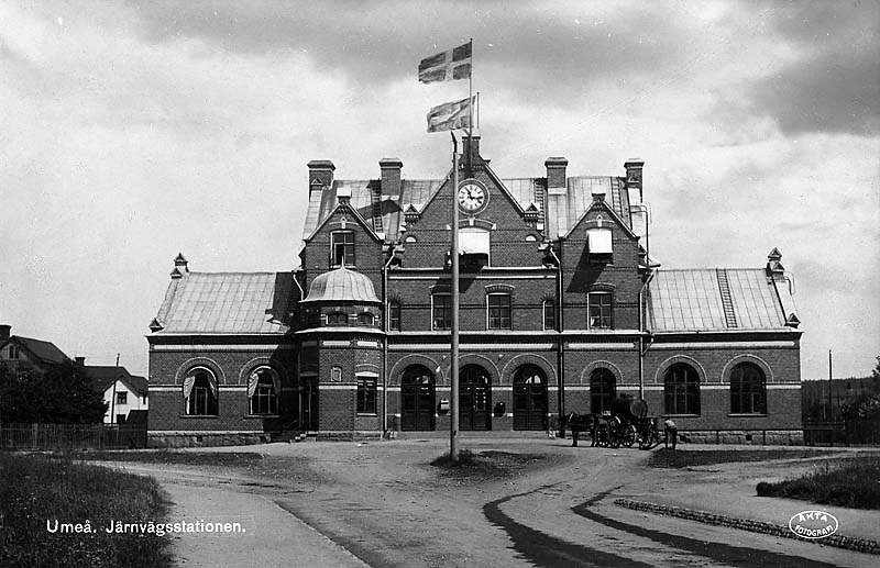 Järnvägsstationen.; Byggnadsverk; Järnvägsstation; Kommunikationsväsen